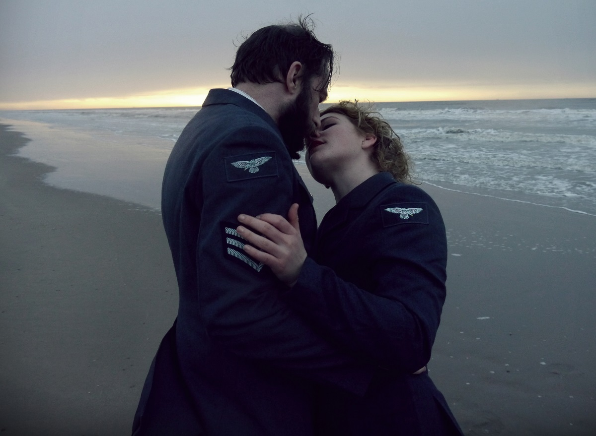 Theater- und Filmproduktion "Die Auswerterin", 2014, mit Eric Lenke, Carolin-Sophie Göbel